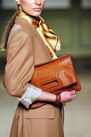 Ligne de Veronique Branquinho